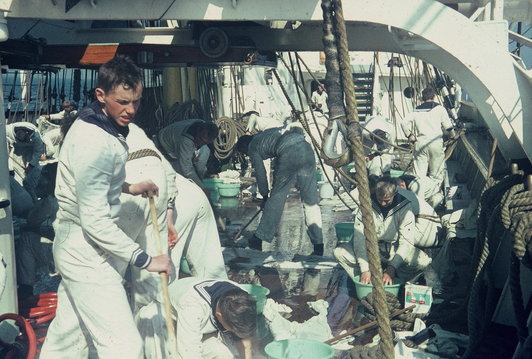 Waschtag auf der Gorch Fock (1958)